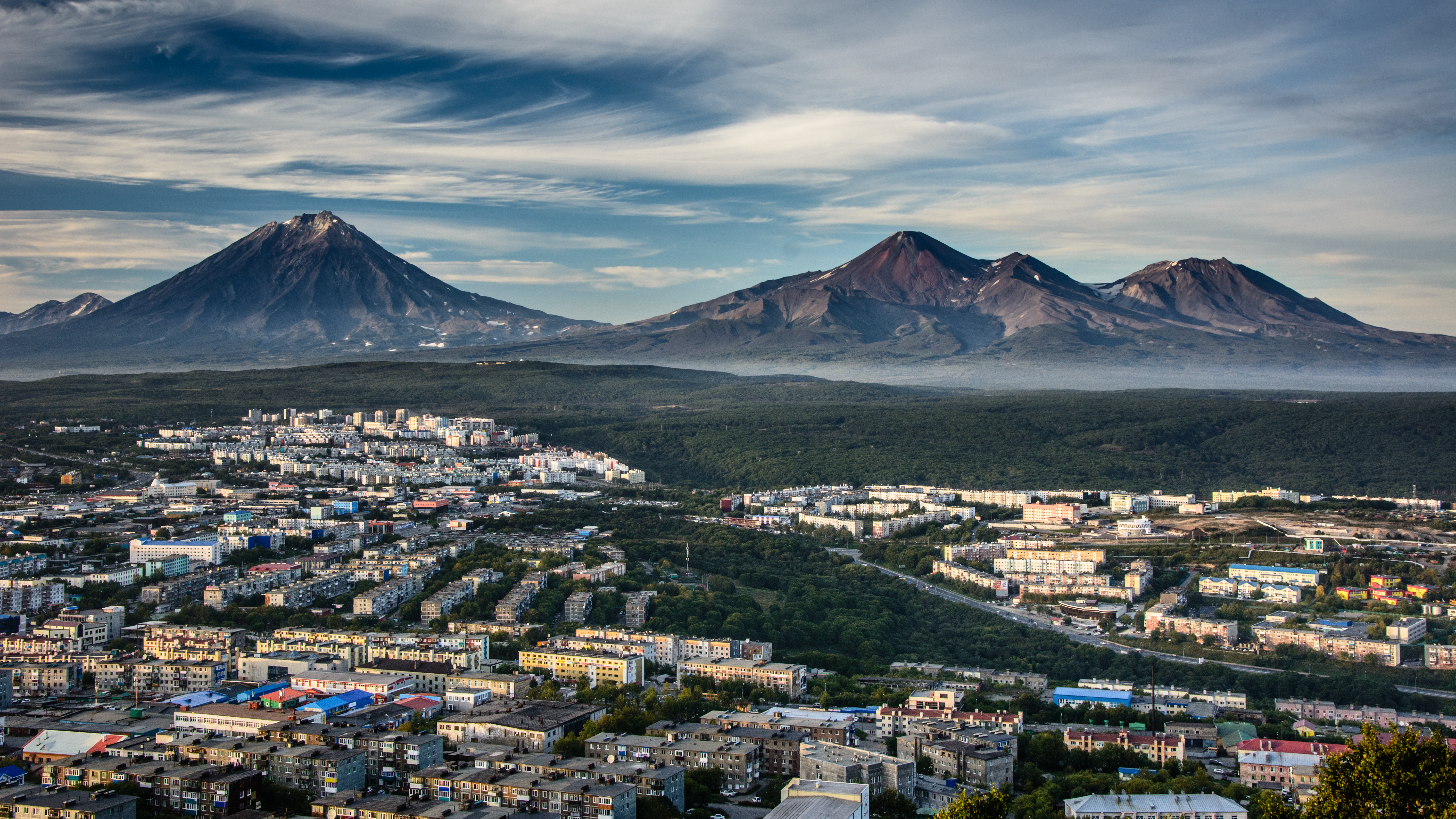 Volcanoes Koryaksky, Avachinsky, and Kozelsky seen from Petropavlovsk-Kamchatsky.